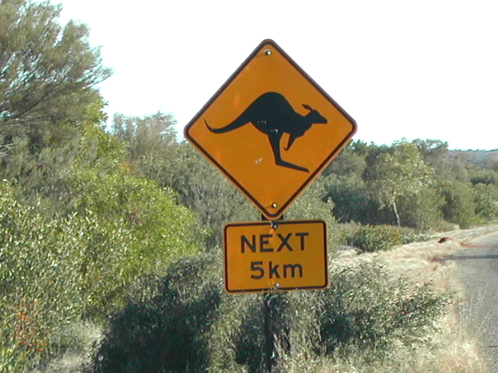 Australescht Stroossen-Gefore-Warnschëld: Opgepasst, Känguren.